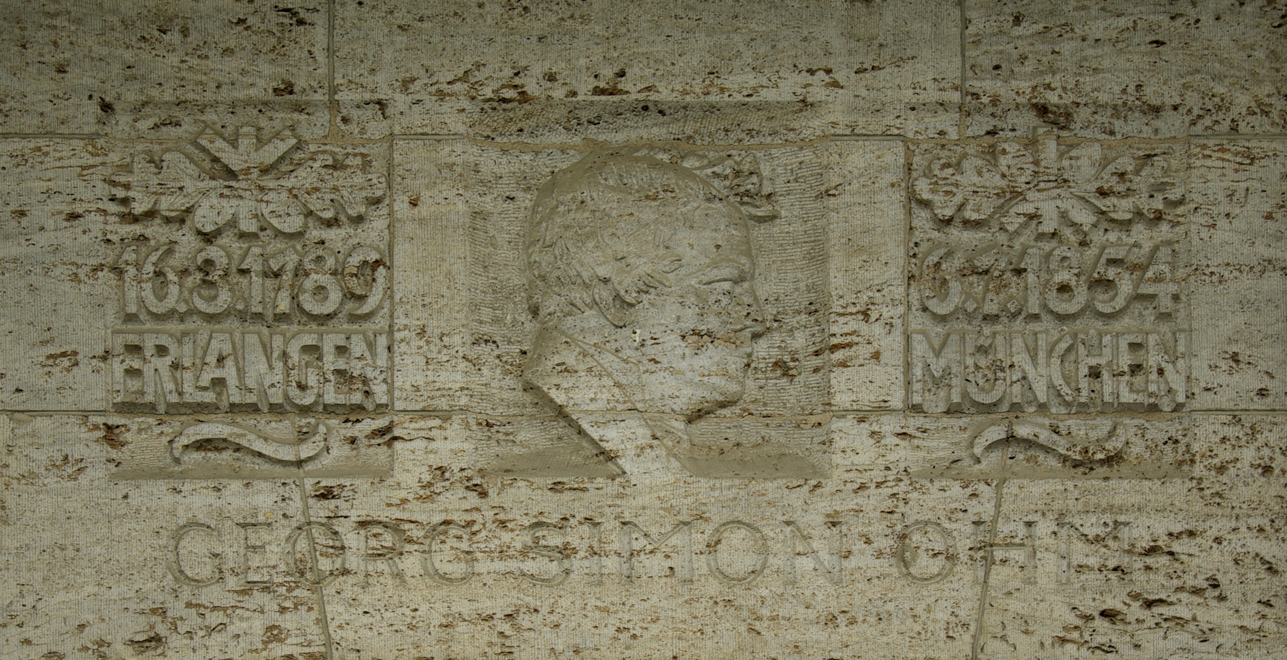 Das Relief des Bildhauers Christian Wrede über dem Haupteingang des ehemaligen Verwaltungsgebäudes der Paul Gossen GmbH in Erlangen zeigt den Physiker Georg Simon Ohm.